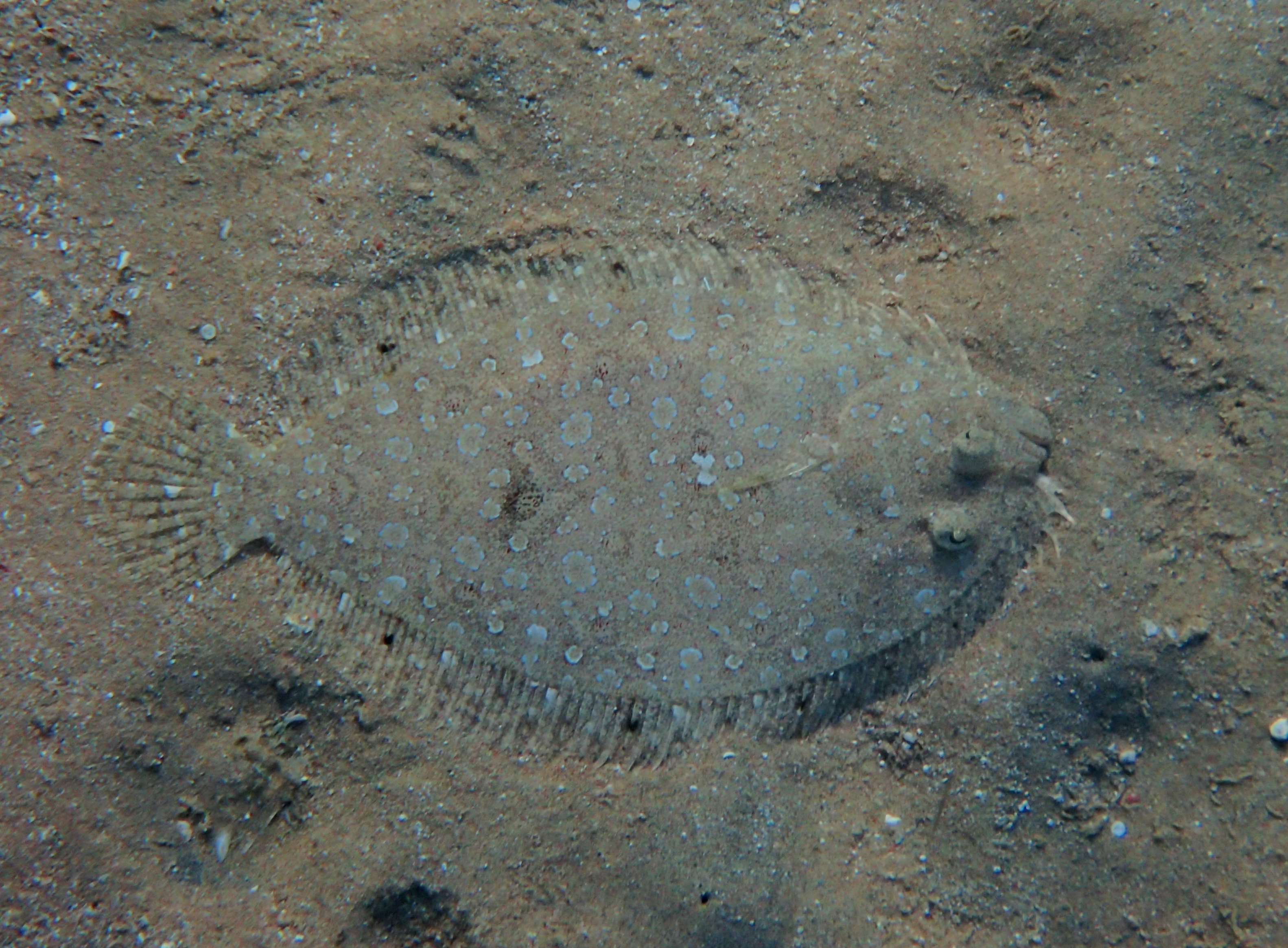 Solea elongata Vörös tenger, Makadi bay